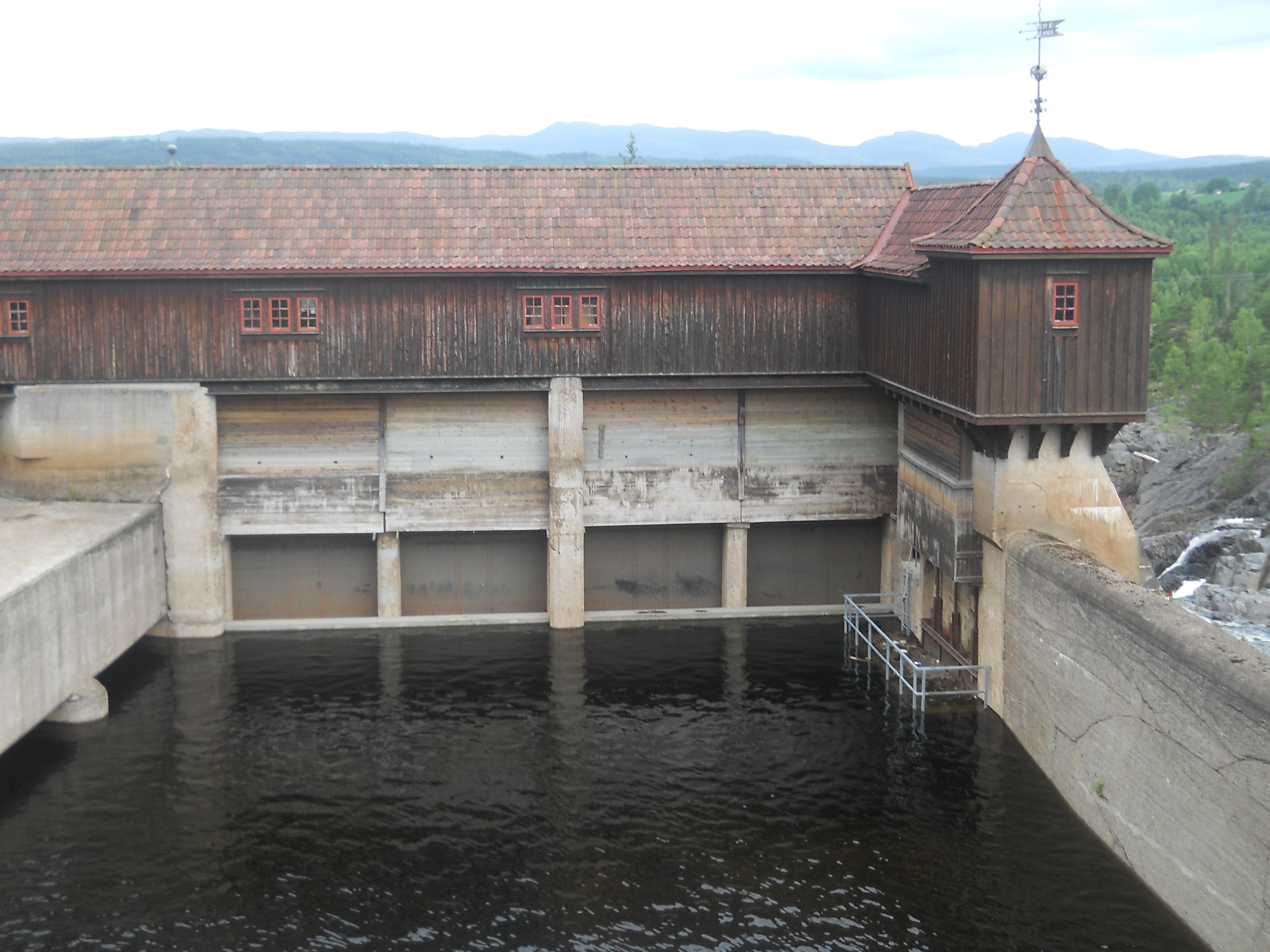 Српски (ћирилица): Електрана